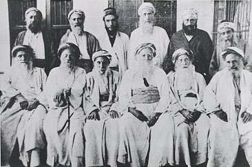 חכם אברהם הלל יחד עם רבני בגדד בשנת 1906